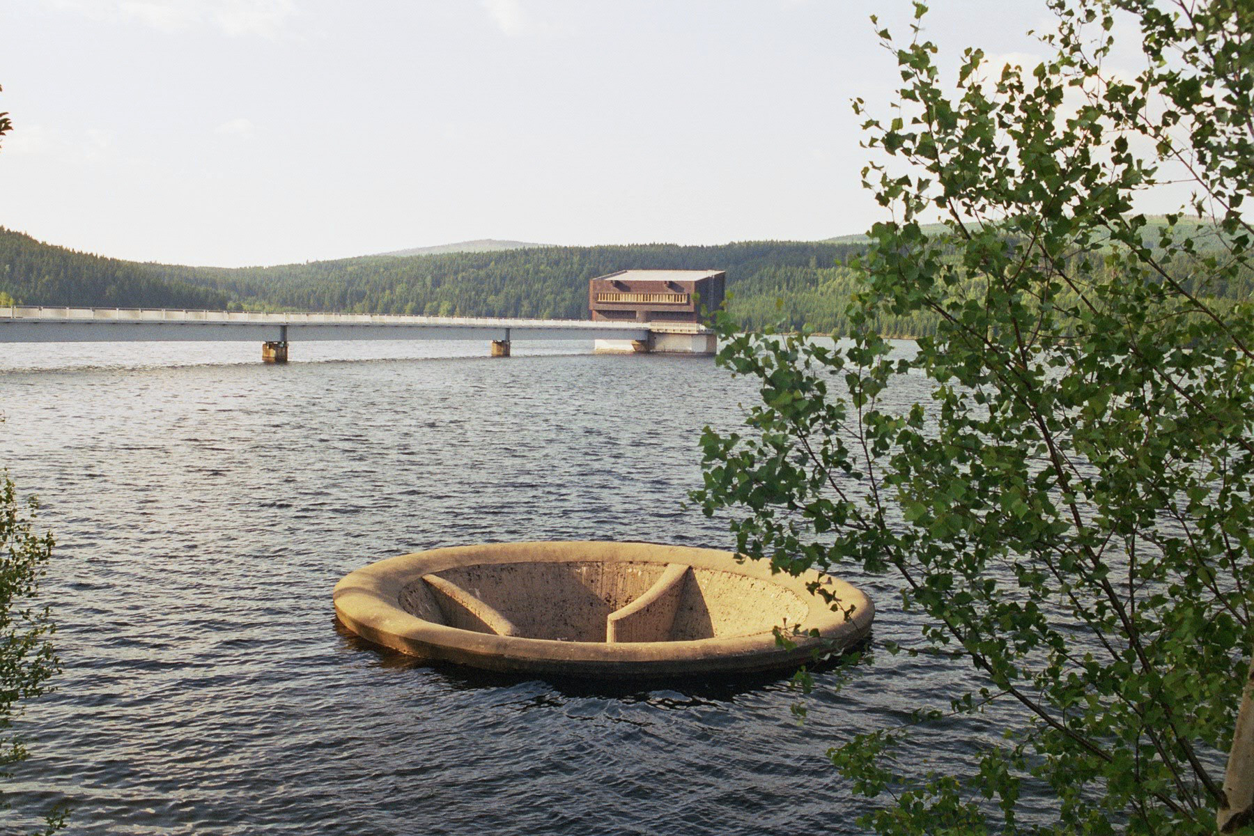 Vodní nádrž Josefův Důl v Jizerských horách. Přepad a sdružený objekt.